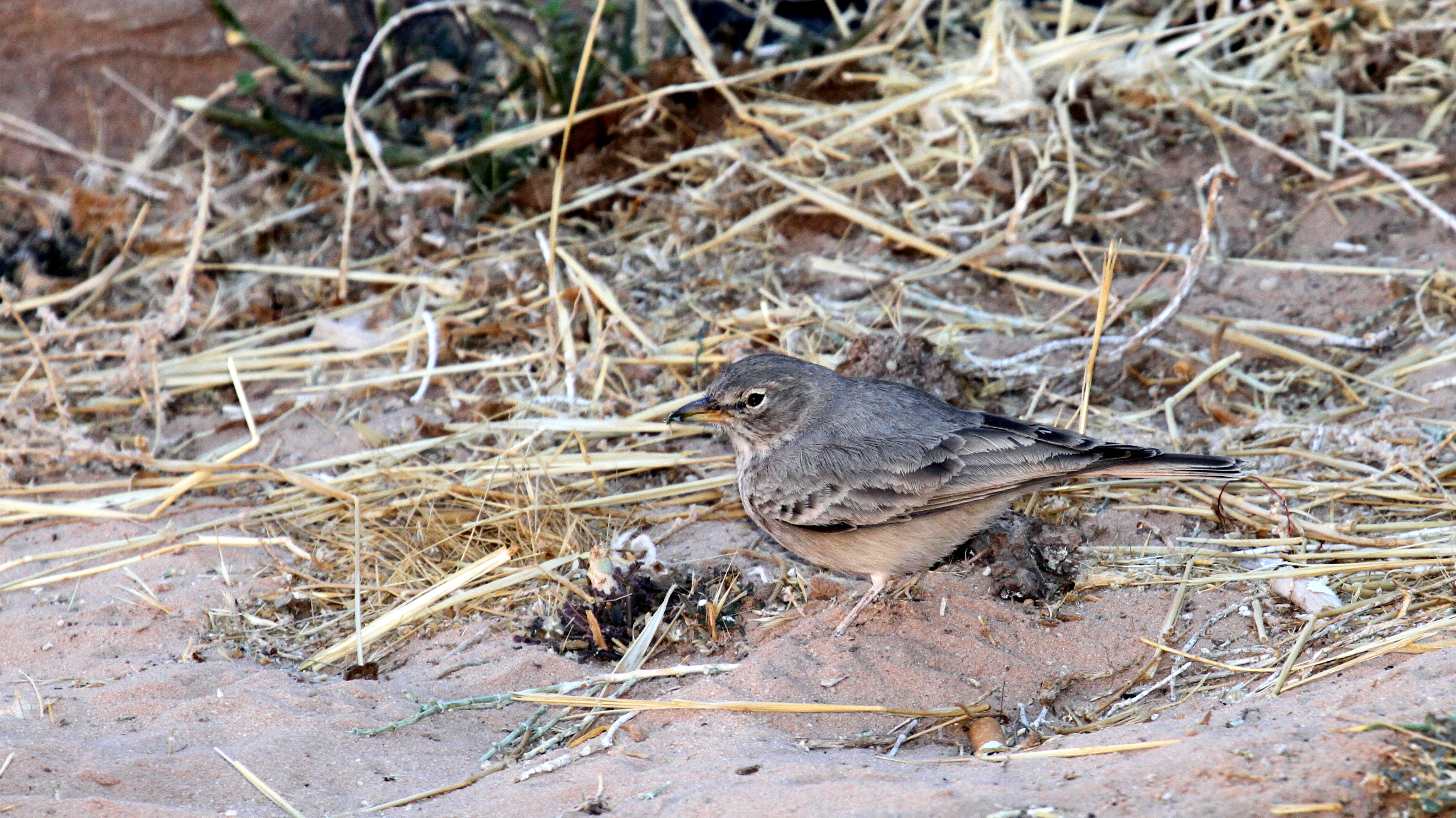 Desert Lark